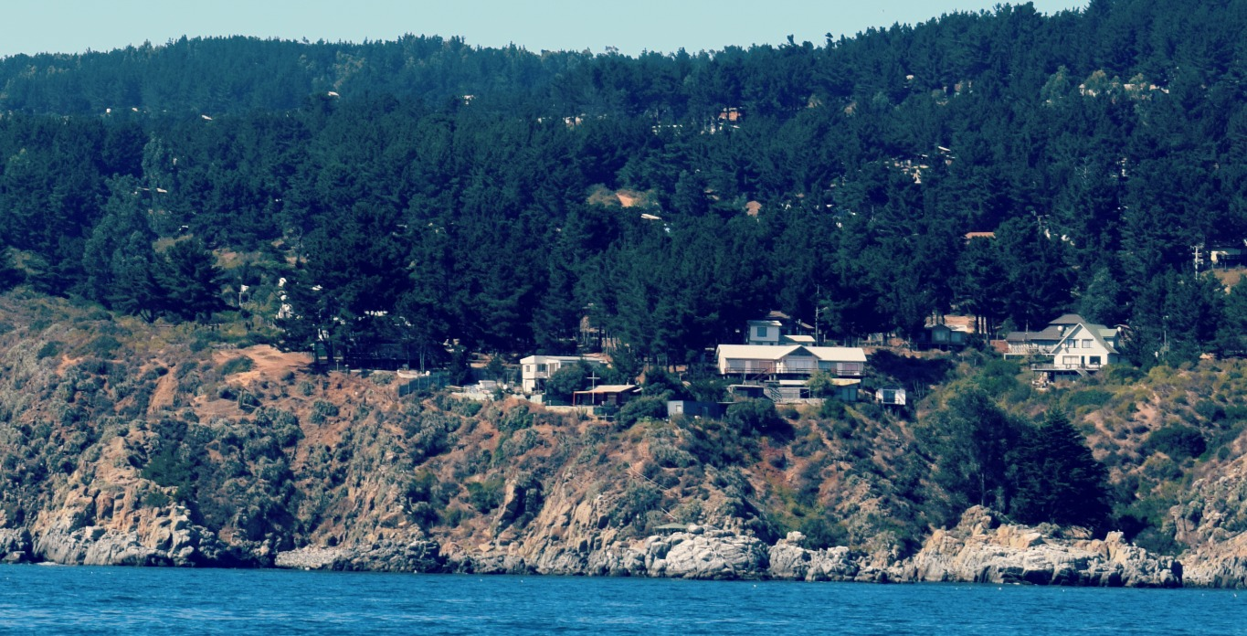 Costa norte de Punta Curaumilla, ubicado en la localidad Laguna Verde, comuna de Valparaíso, Chile.